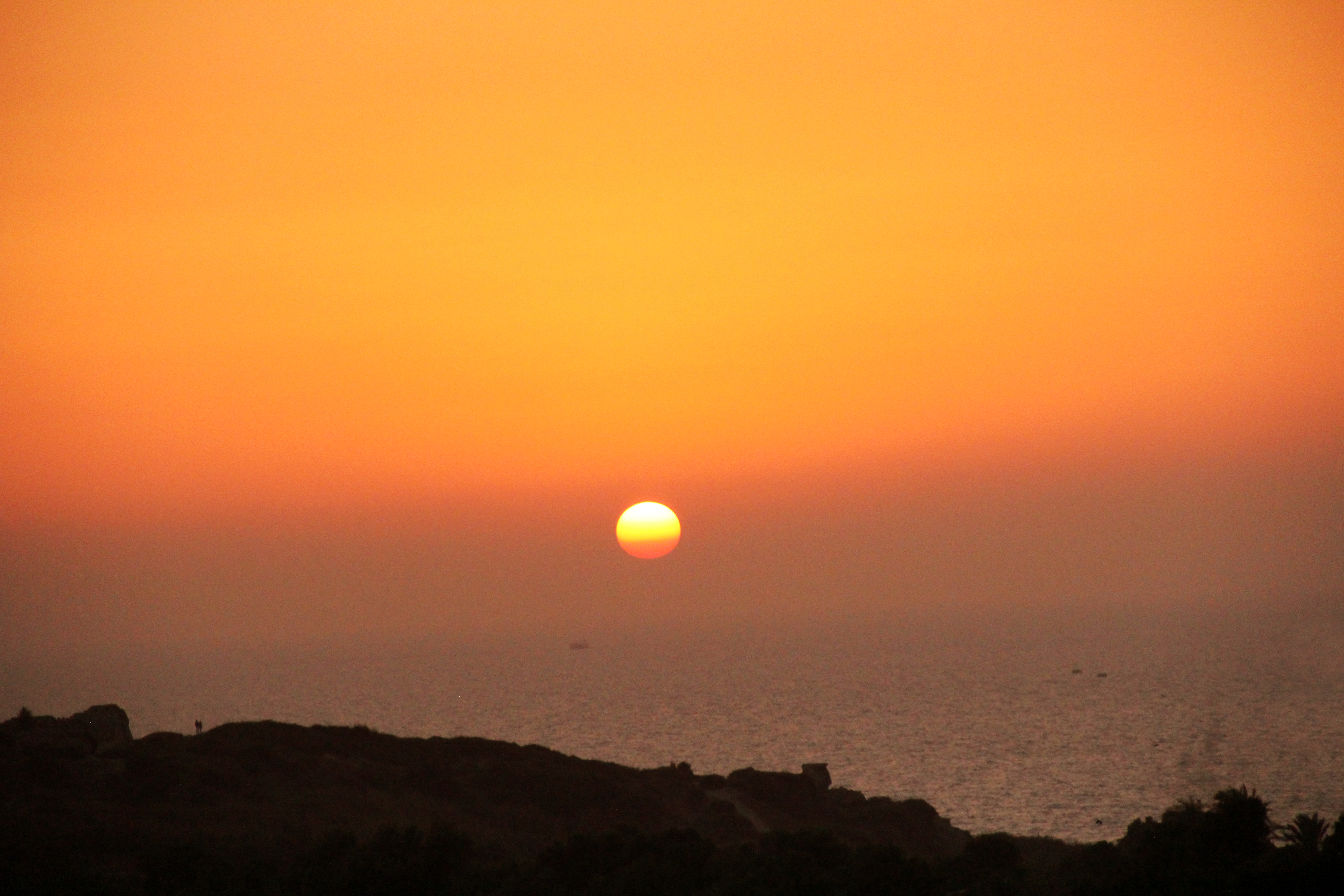 שרידי עיר מבוצרת (2 ק"מר). על קו חוף הים. בעיר נחשפו חומות, שער בנוי מלבנים, מקדשים, ומבנים מנומנטליים. ראשית החפירות החלו ע"י לידי סטנהוף 1815. כיום החפירות נערכות ע"י משלחת בראשות ל"א סטייגר.